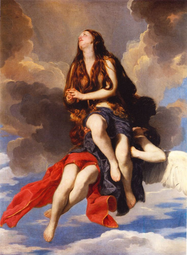 Maddalena sollevata da un angelo